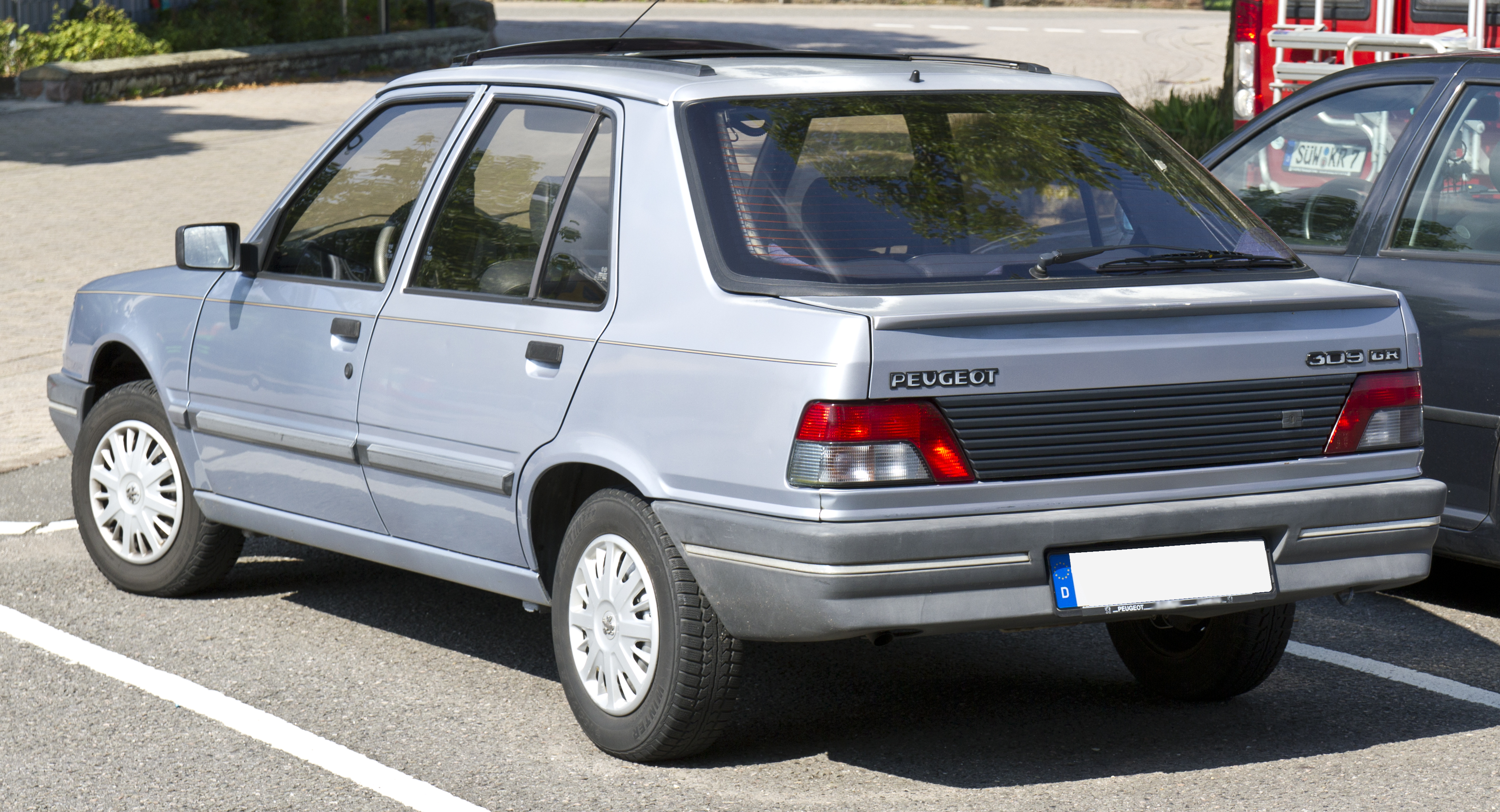 Peugeot 309 GR